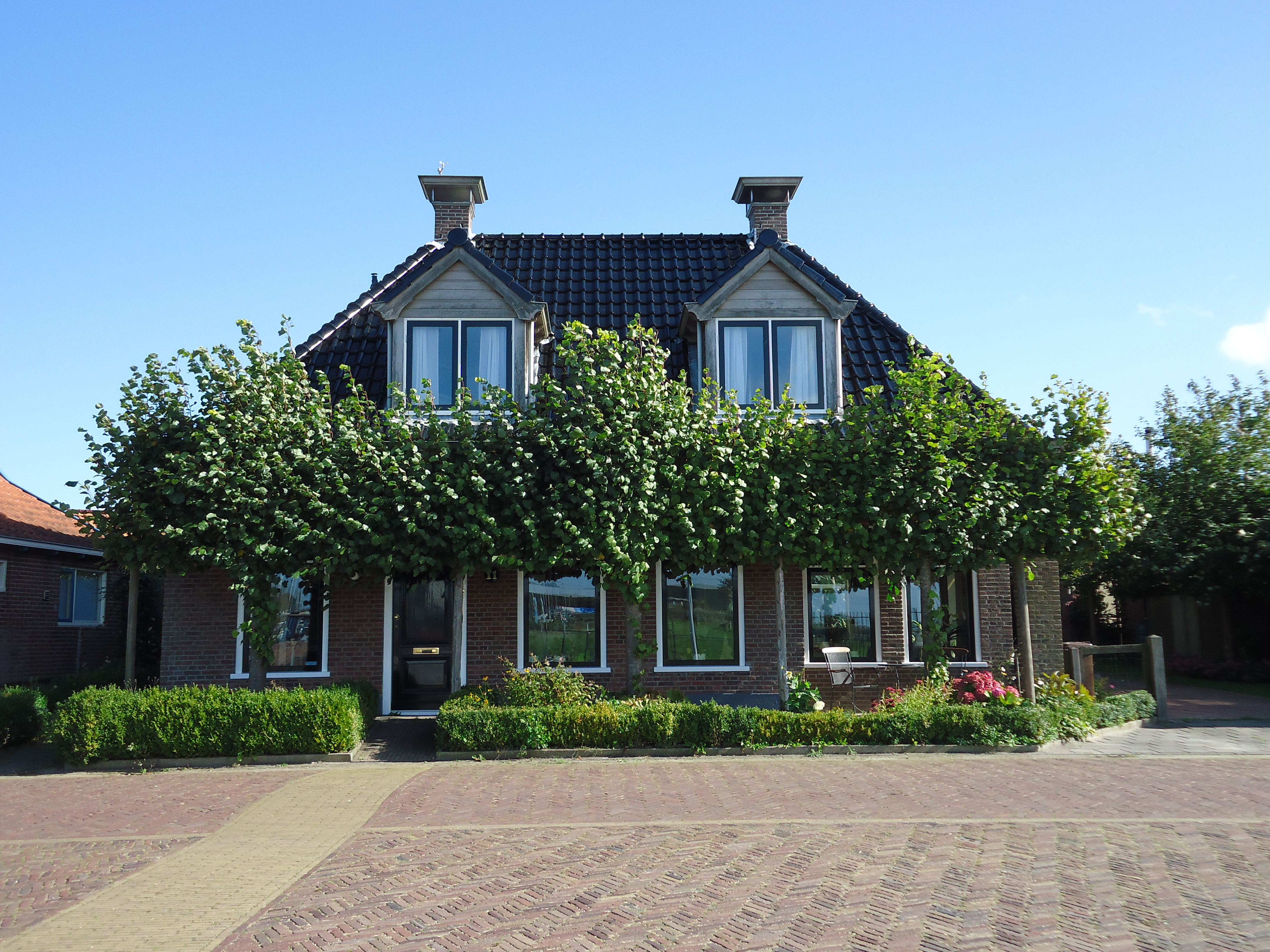 Warns haven